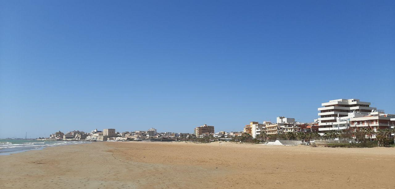 Il comune siciliano di Pozzallo visto dalla Spiaggia Pietrenere